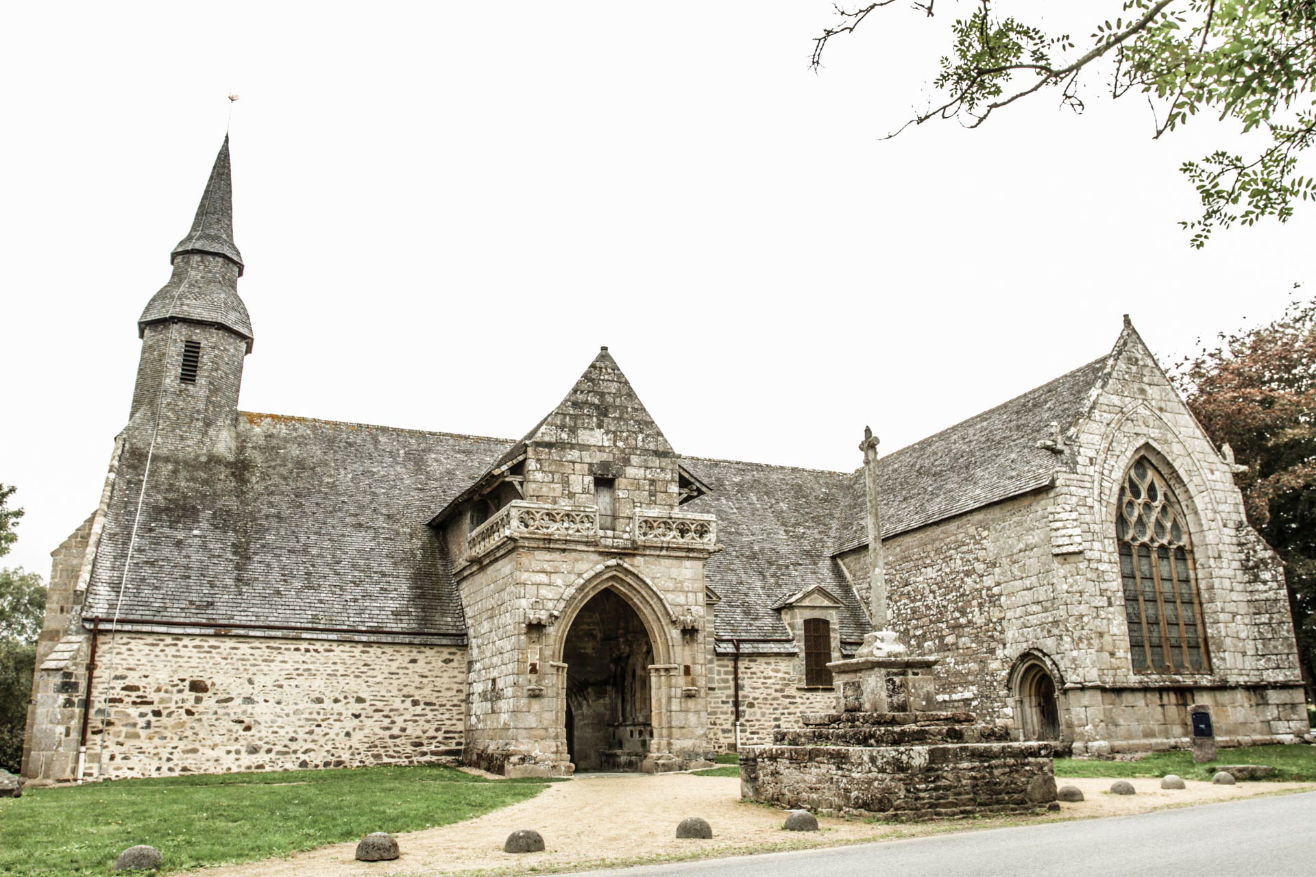 Chapelle de Kermaria an Iskuit, vue du sud